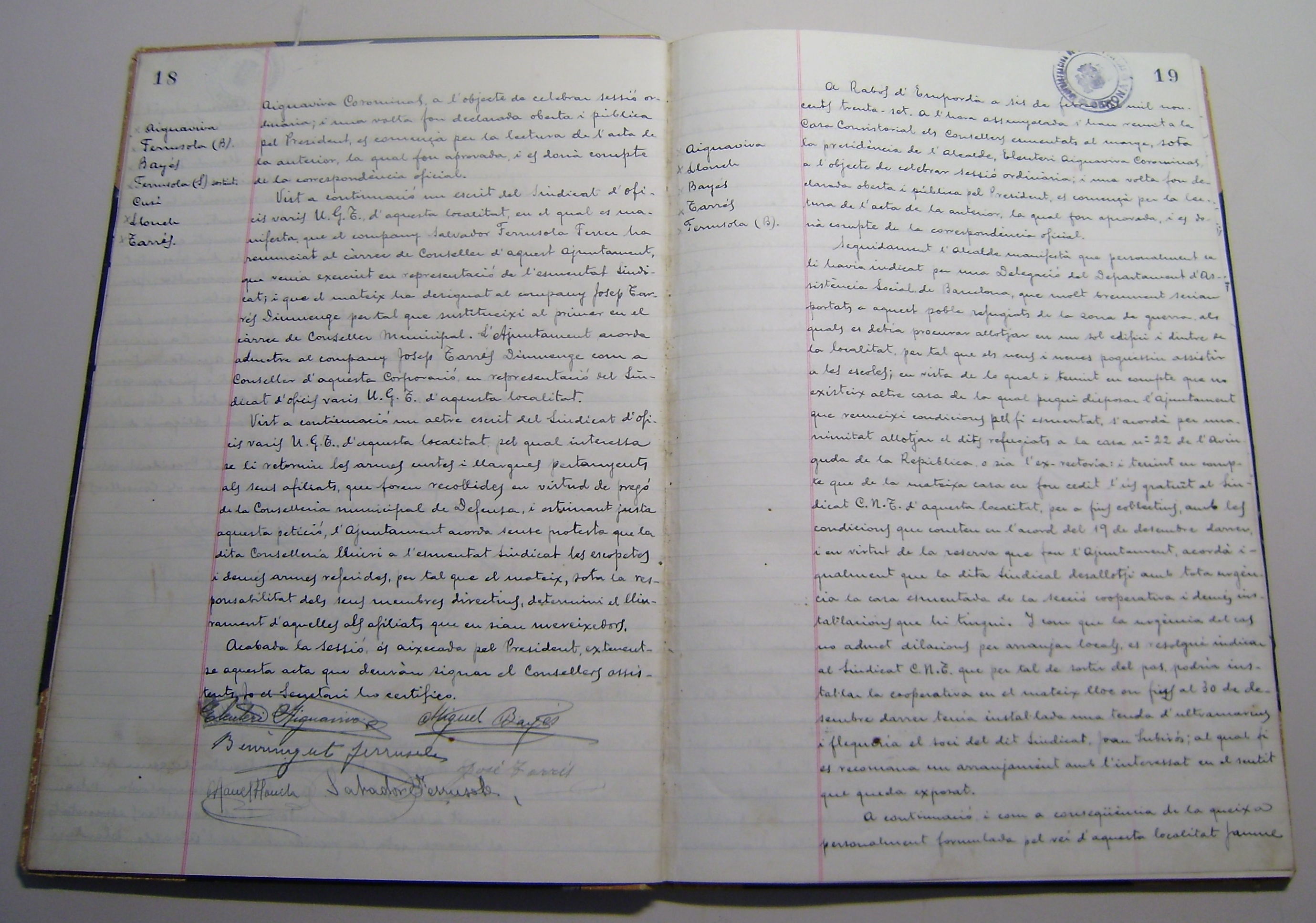 L´ACAE té com a un dels objectius prioritaris la salvaguarda del patrimoni documental dels nombrosos ajuntaments petits que componen la comarca, atès que per la manca de recursos es córre el risc que es malmeti o, fins i tot, que es perdi. El nombre total de fons municipals dipositats a l´actualitat (2008) és de trenta-set, a més de la inventariació d´una catorzena més que es retornaren als ajuntaments d´origen, la qual cosa ofereix a l´linvestigador i estudiós que s´adreça a l´Arxiu un conjunt de documentació d´una riquesa i continuïtat en el temps i l´espai molt important, encara que també cal assenyalar que la majoria de les sèries documentals dels ajuntaments altempordanesos comencen, de manera més o menys continuada, a partir de la segona meitat del segle XIX. Dades tècniques Títol: Llibre d´actes de l´Ajuntament de Rabós d´Empordà Data: 1936-1939 Suport material: paper amb cobertes de cartró Mides: 218 x 315 mm